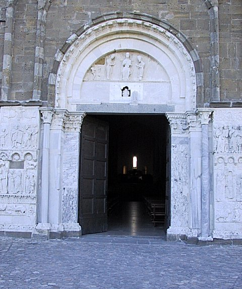 Abbazia di San Giovanni in Venere. Ingresso dell'Abbazia. Portale detto "della luna" - agosto 2004 - Fotografia scattata dall'utente Francojotti. Di PD ed uso assolutamente libero.